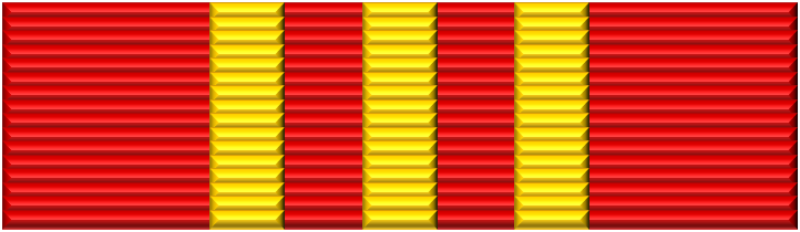 Vietnam Hochiminh Order ribbon